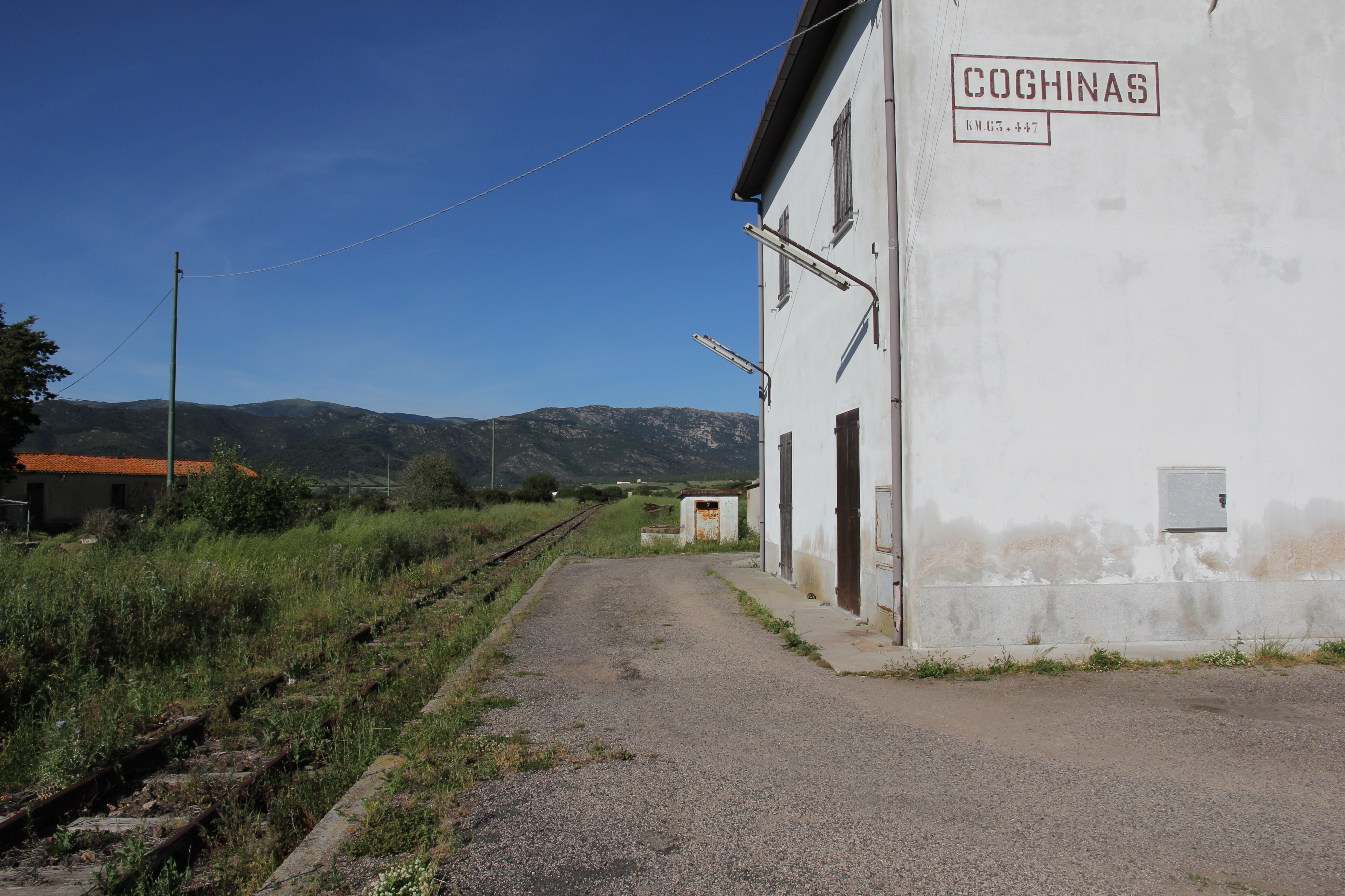 Perfugas, stazione ferroviaria di Coghinas - Ferrovia Sassari-Tempio-Palau